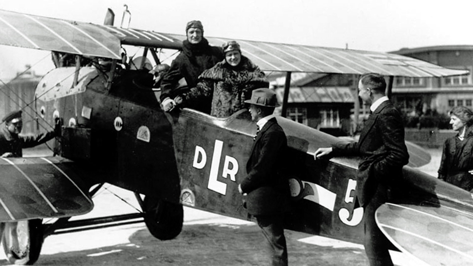 LVG C.VI der Deutschen Luft-Reederei mit der Kennung D.L.R. 5 mit den Passagieren Hans Albers und Elsbeth Kurasch.